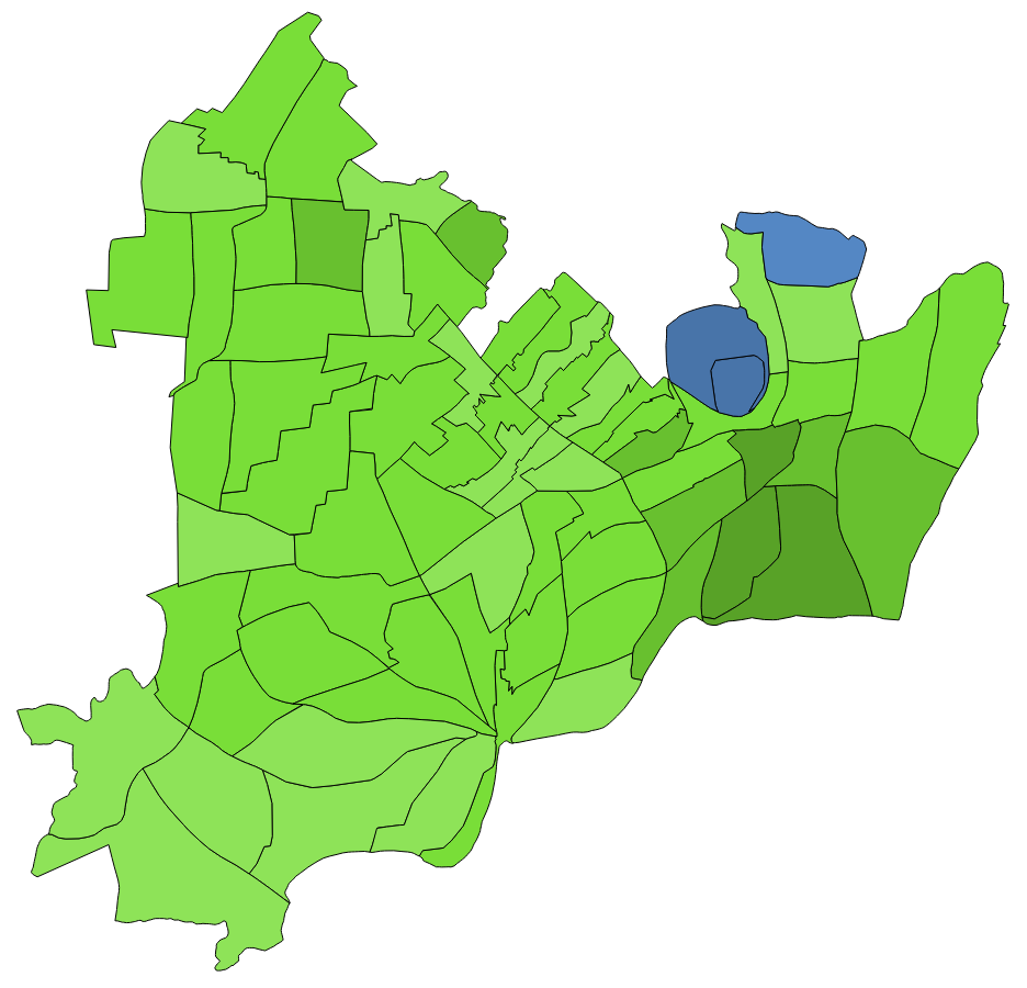 顏色對照表